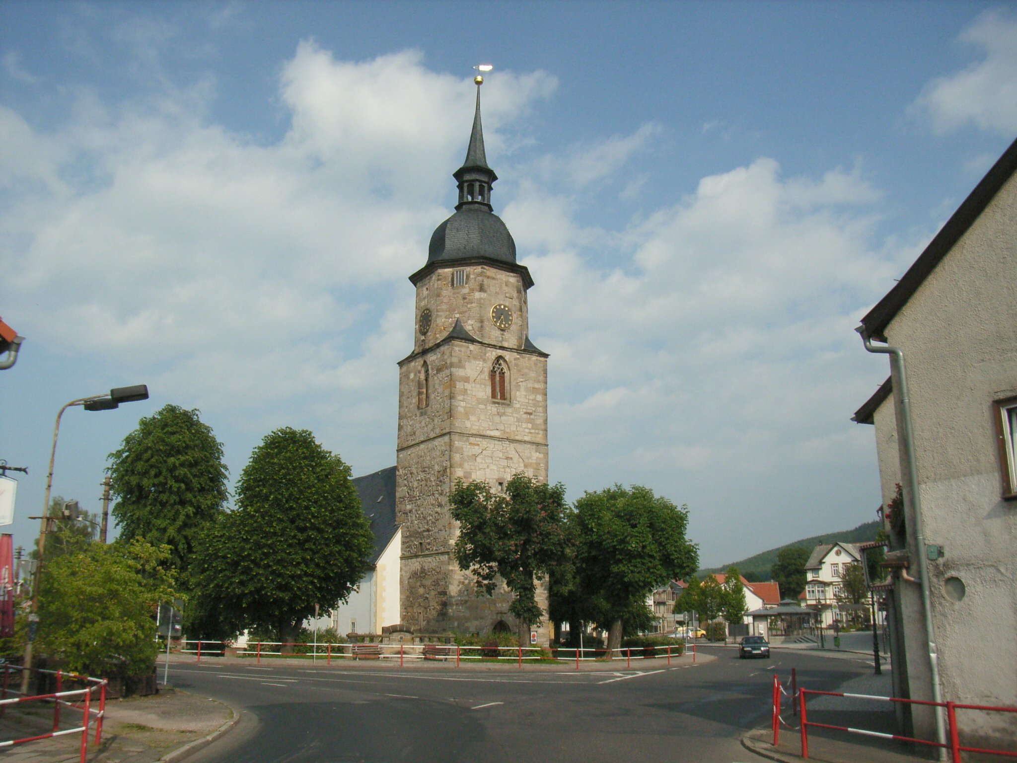 Friedrichroda, Stadtkirche